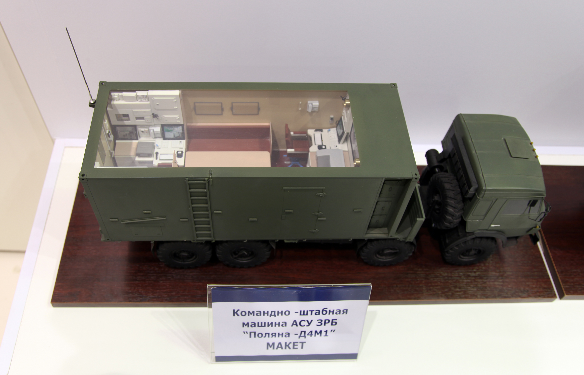 Модель пункта боевого управления АСУ Поляна-Д4М1 (Combat control post of Polyana-D4M1 system)